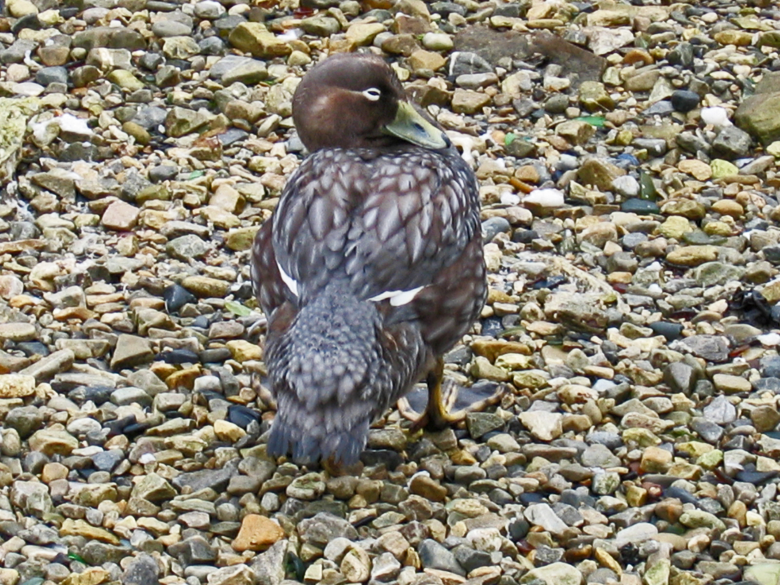 female Falkland Flightless Steamer Duck/weibliche Falkland-Dampfschiffente (Tachyeres brachypterus) at Port Stanley (Falklands/Malvinas)